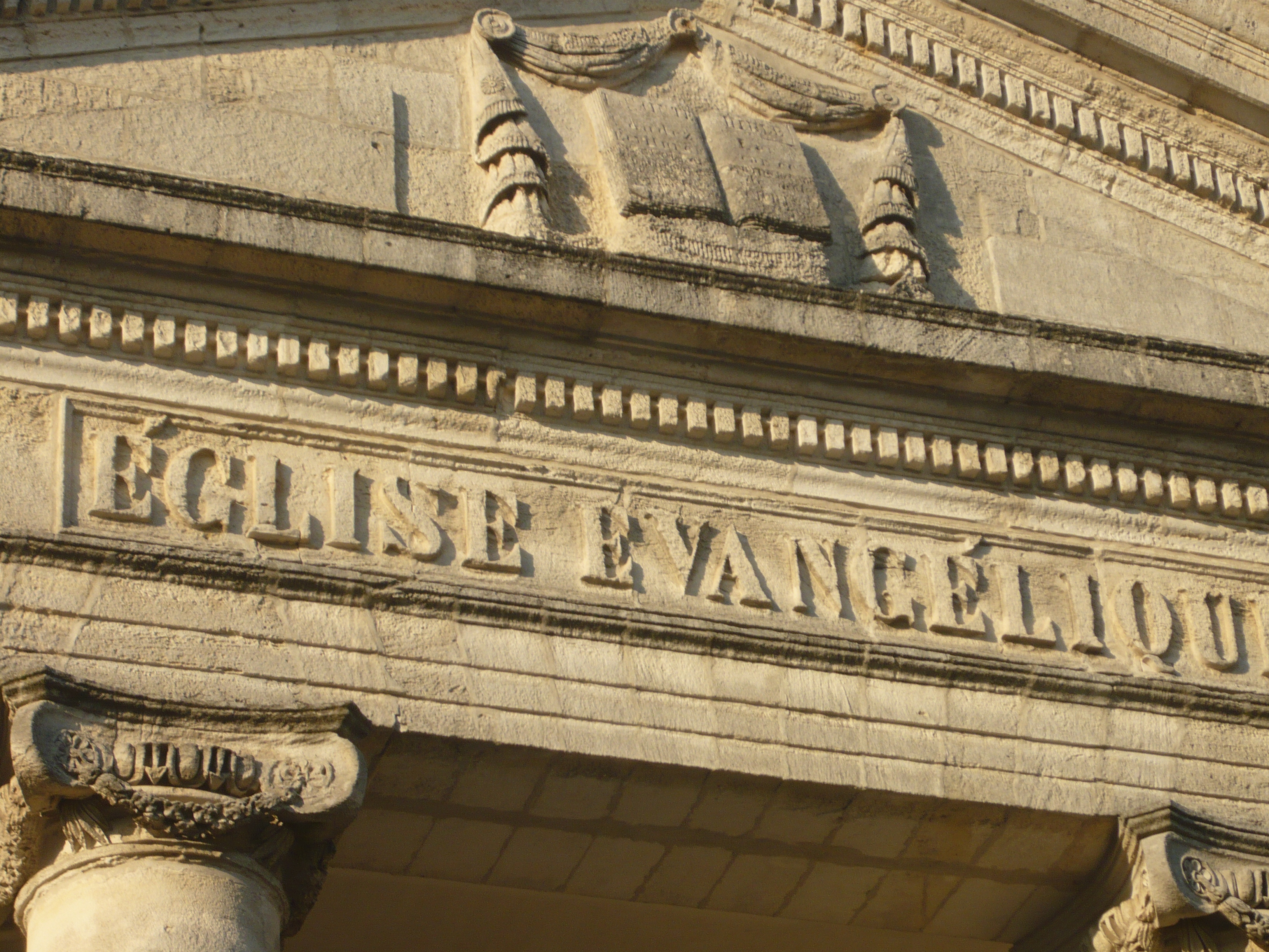 Détail du fronton du Temple de Marennes (17).